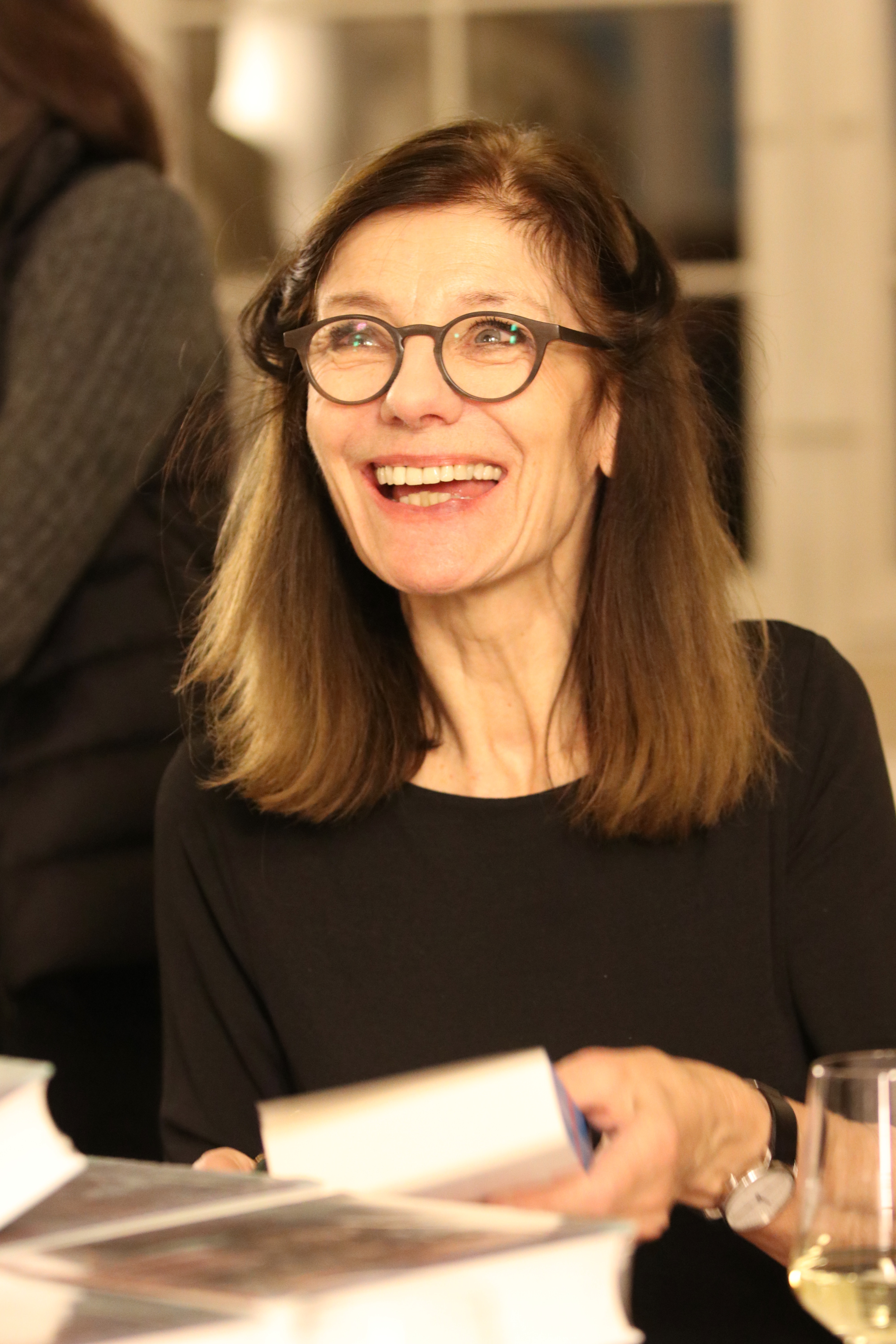 Die Schriftstellerin Ursula Krechel beim Signieren im Anschluss an die Verleihung des Jean-Paul-Preises 2019 an sie. Ort: Schloss Nymphenburg in München